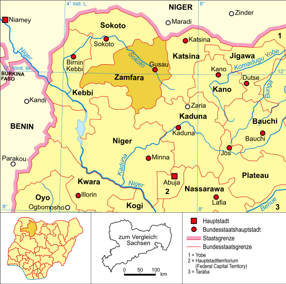 politische Karte Nigerias (Bundesstaat Zamfara hervorgehoben)